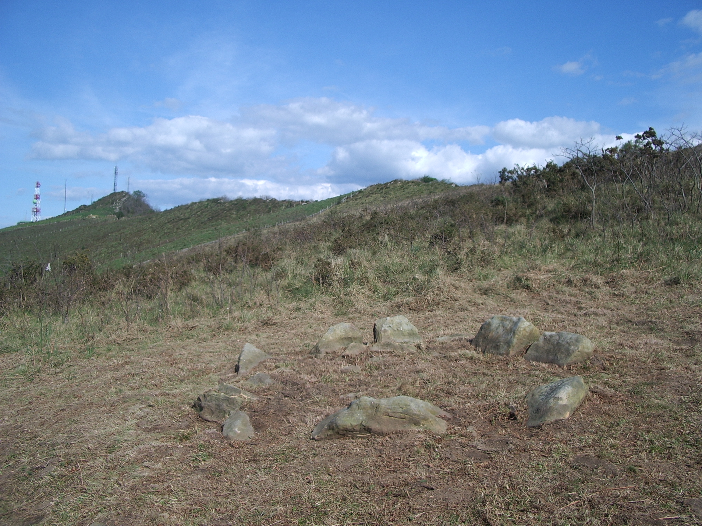 Mendizorrotz I harrespila edo cromlecha